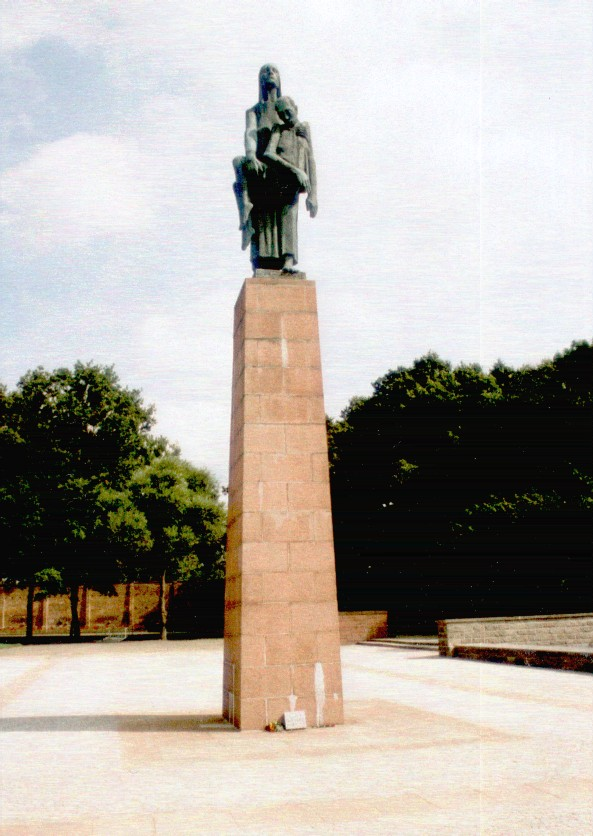 Mahn- und Gedenkstätte KZ Ravensbrück - Mahnmal "Tragende" von Will Lammert am Schwedtsee